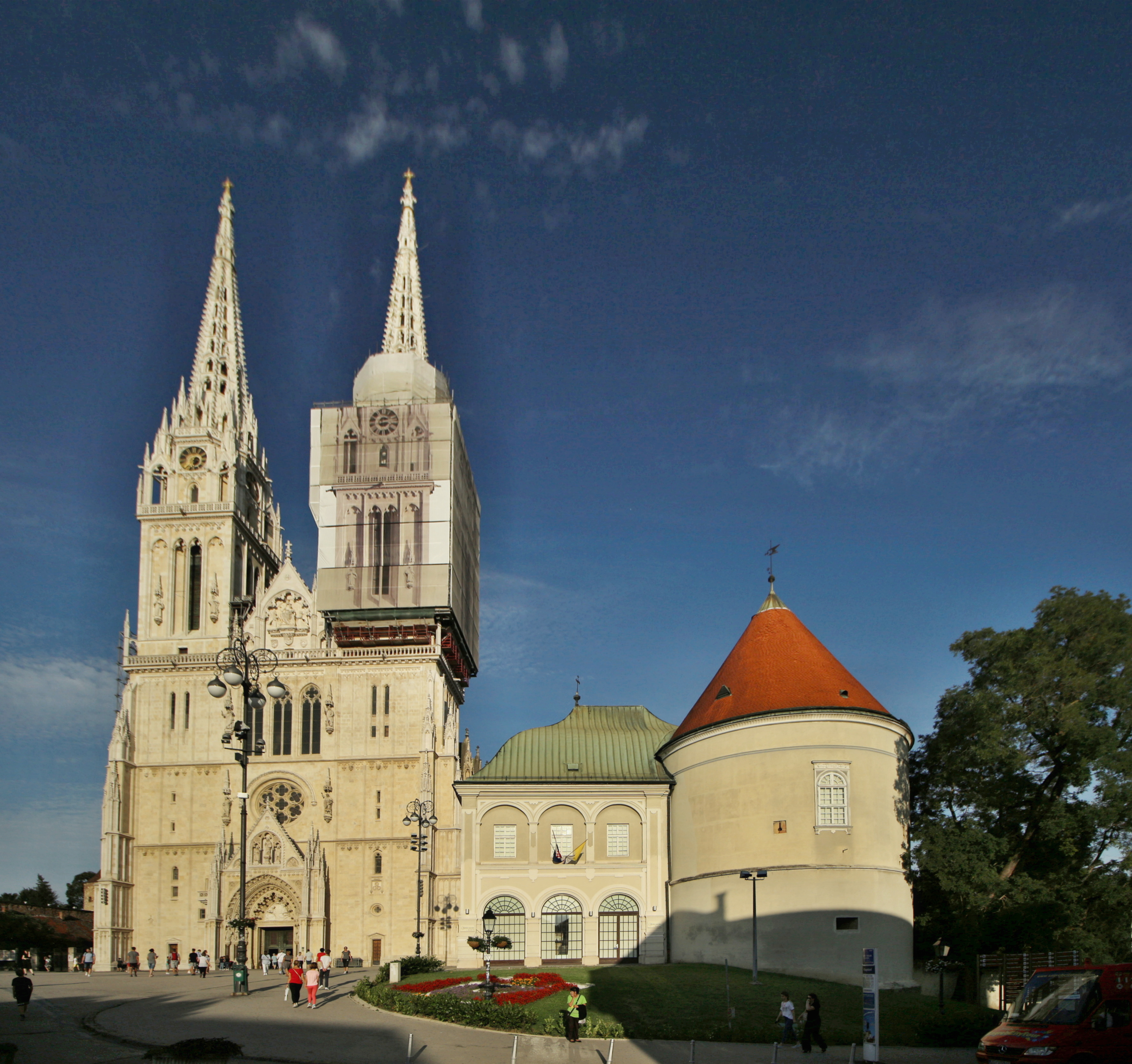 Záhřeb, Kapitol, katedrála a okolí